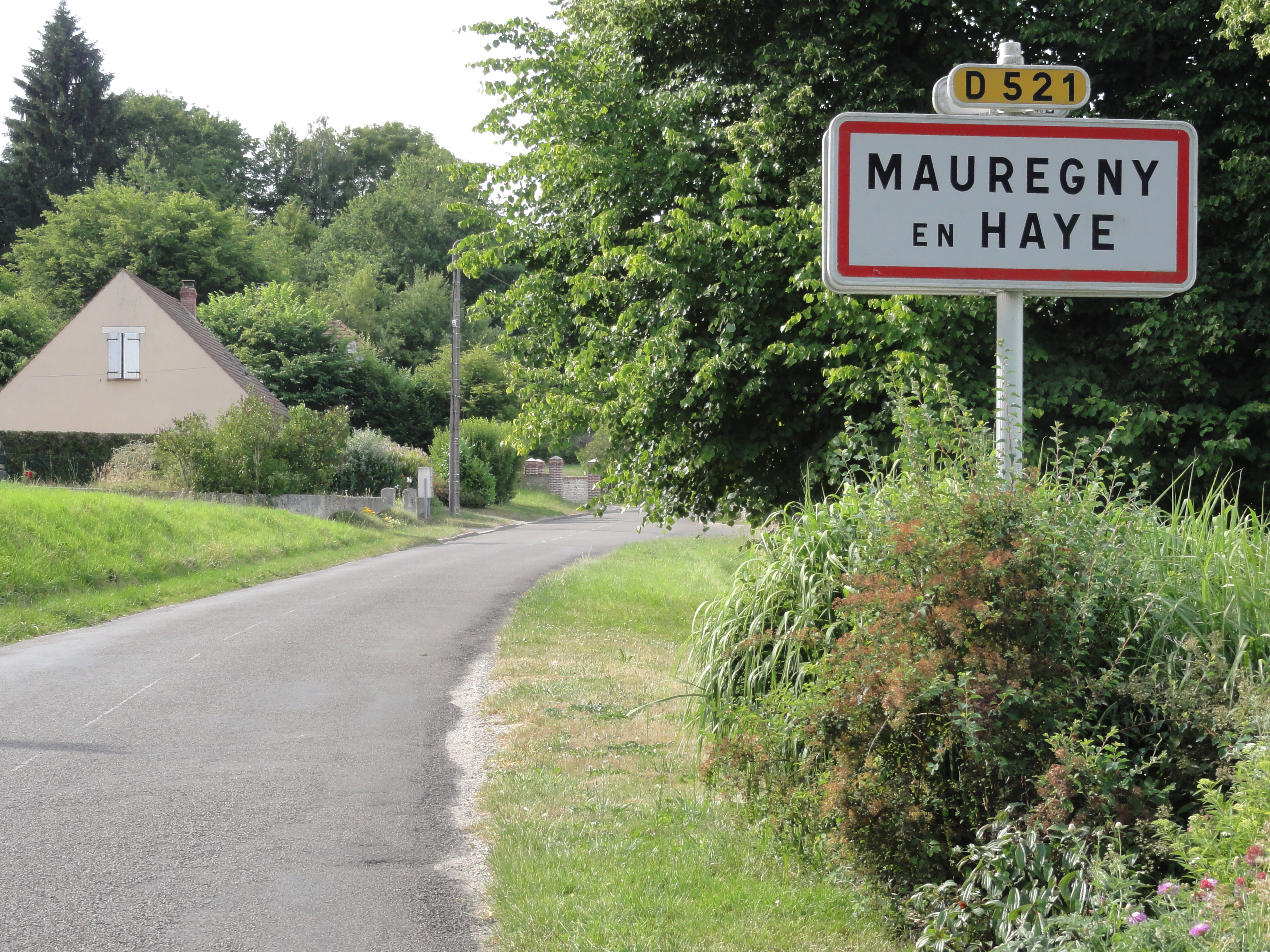 Mauregny-en-Haye (Aisne) city limit sign